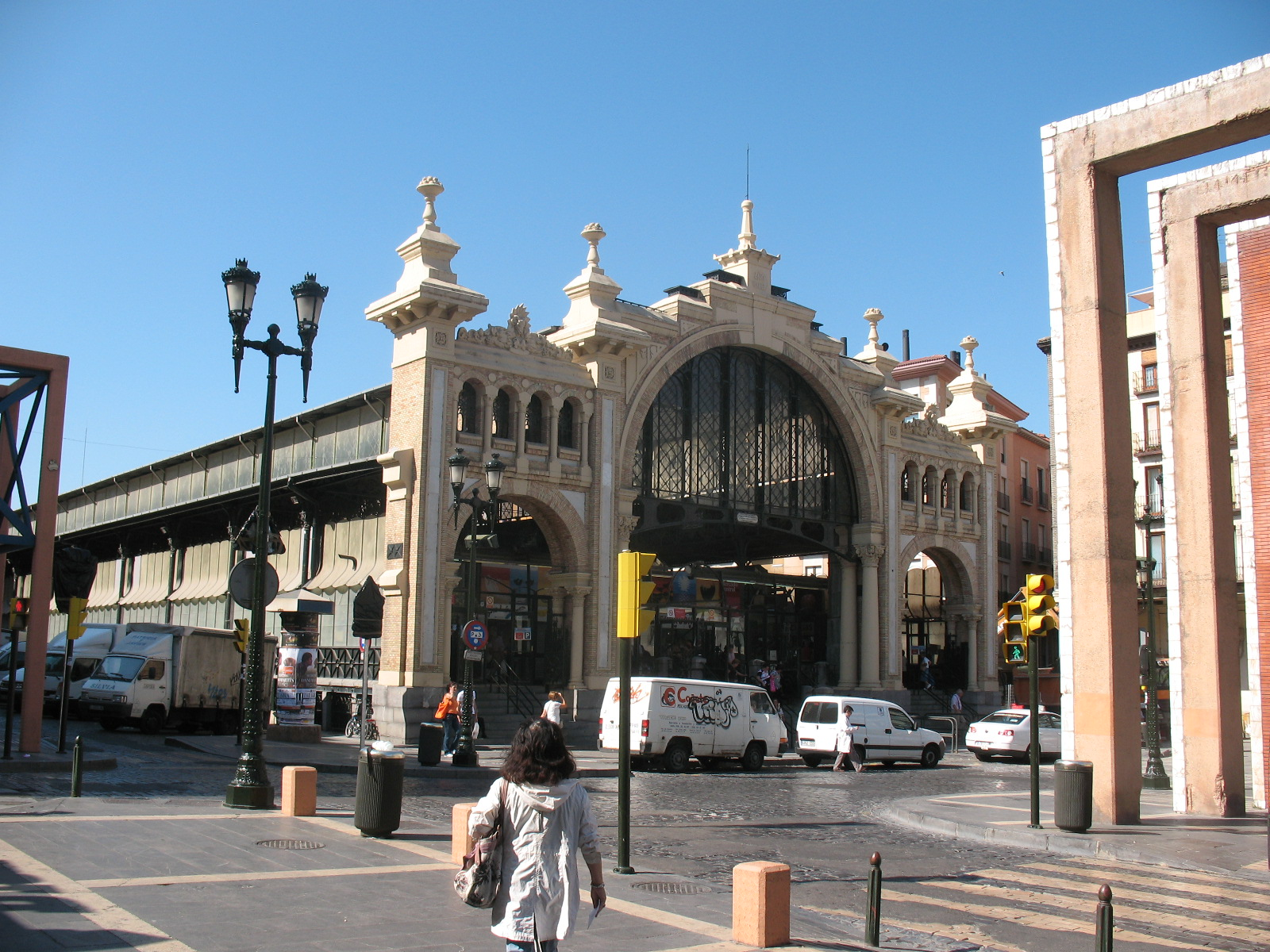 Городской рынок